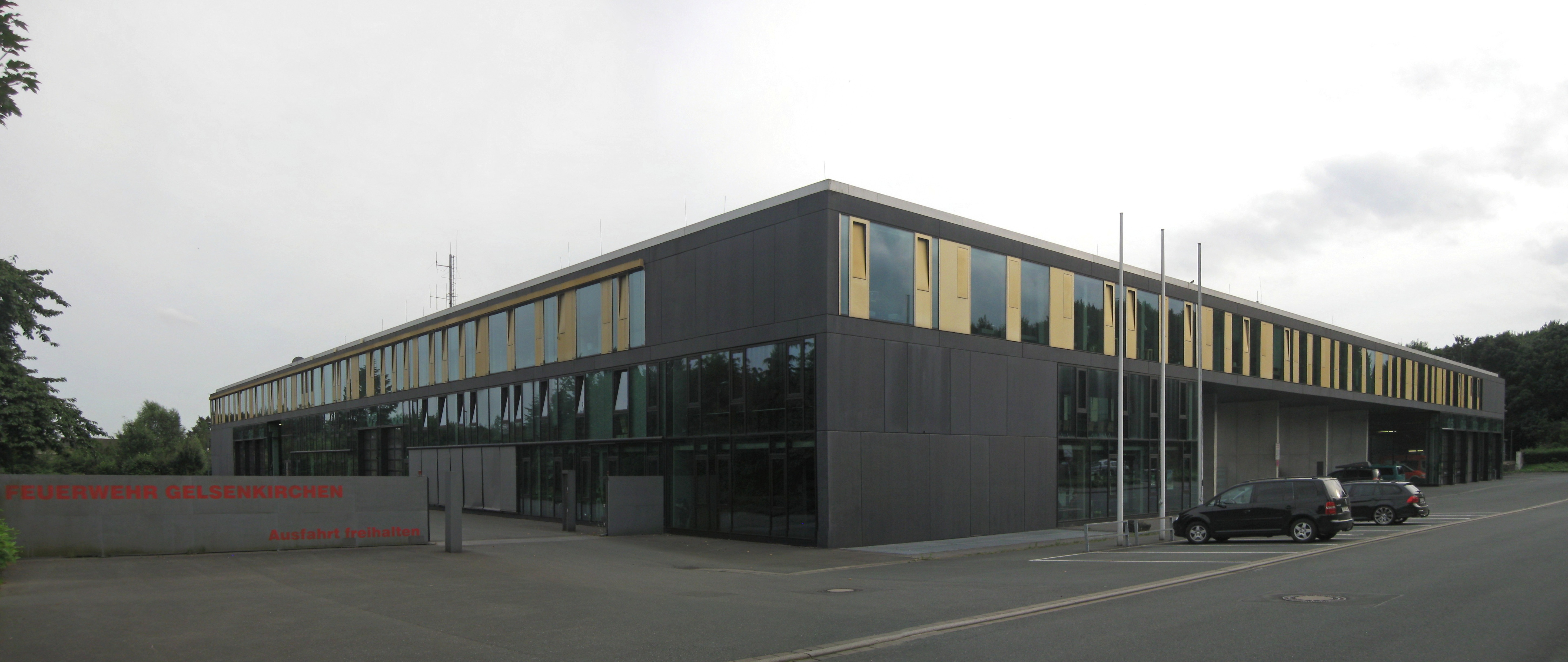 Zentrale Feuer- und Rettungswache 2 (ZFRW Gelsenkirchen) an der Seestraße: aktuelle Gelsenkirchener Hauptfeuerwache (Einweihung 2005).